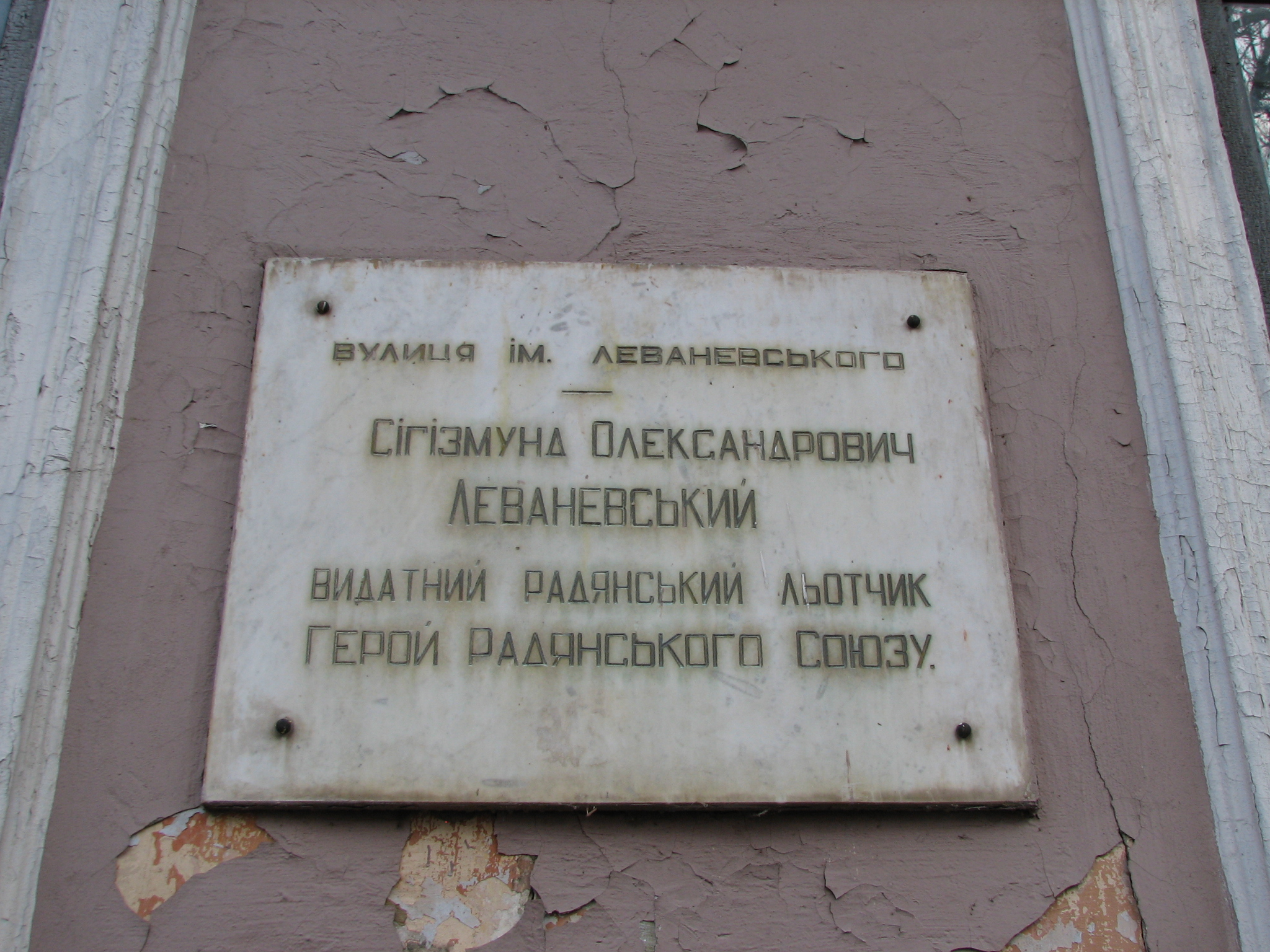 С.О.Леваневський видатний радянський льотчик